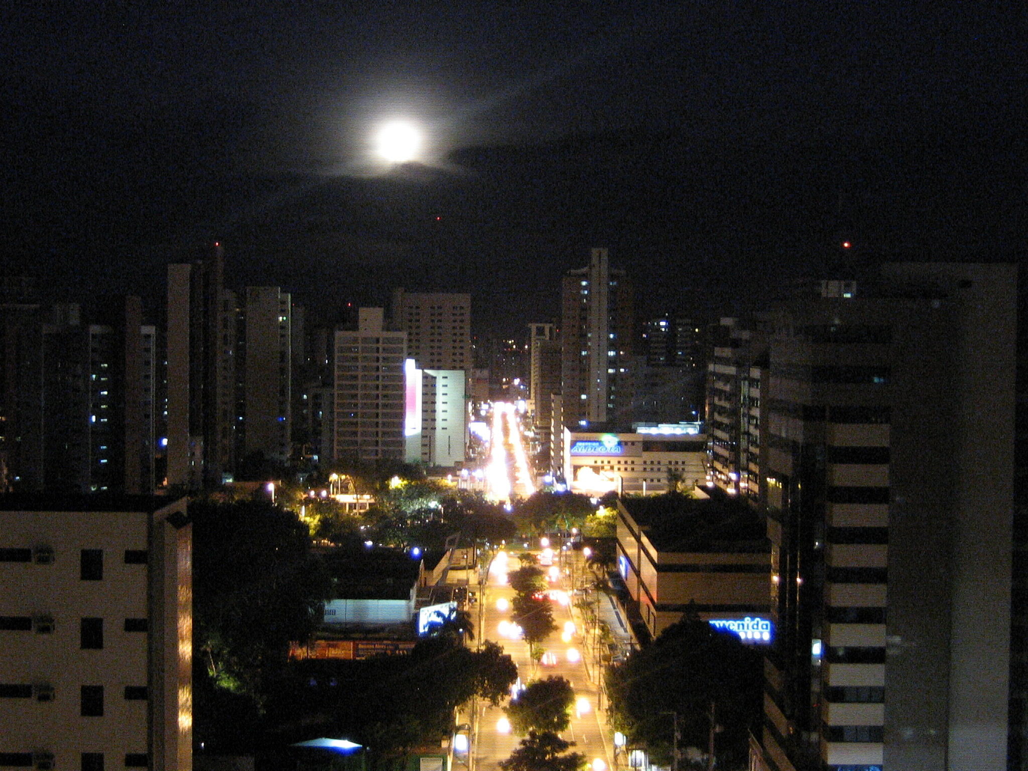 Vista da Avenida Dom Luís à noite. Foto tirada do Boulevard Dom Luís, localizado a Rua Tibúrcio Cavalcante, 810, Aldeota, Fortaleza